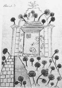 Temple de Tikal dessiné par Eusebio Lara publié en 1853 (cf. Ministère guatémaltèque de la culture et des sports).